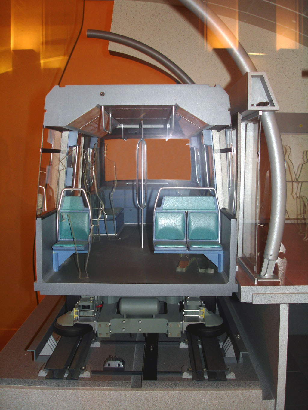 Coupe d'une station de la ligne 14 du métro de Paris, musée des Arts et Métiers, Paris, France.